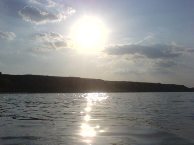 Узбережжя озера Ялпуг, Одеська область.